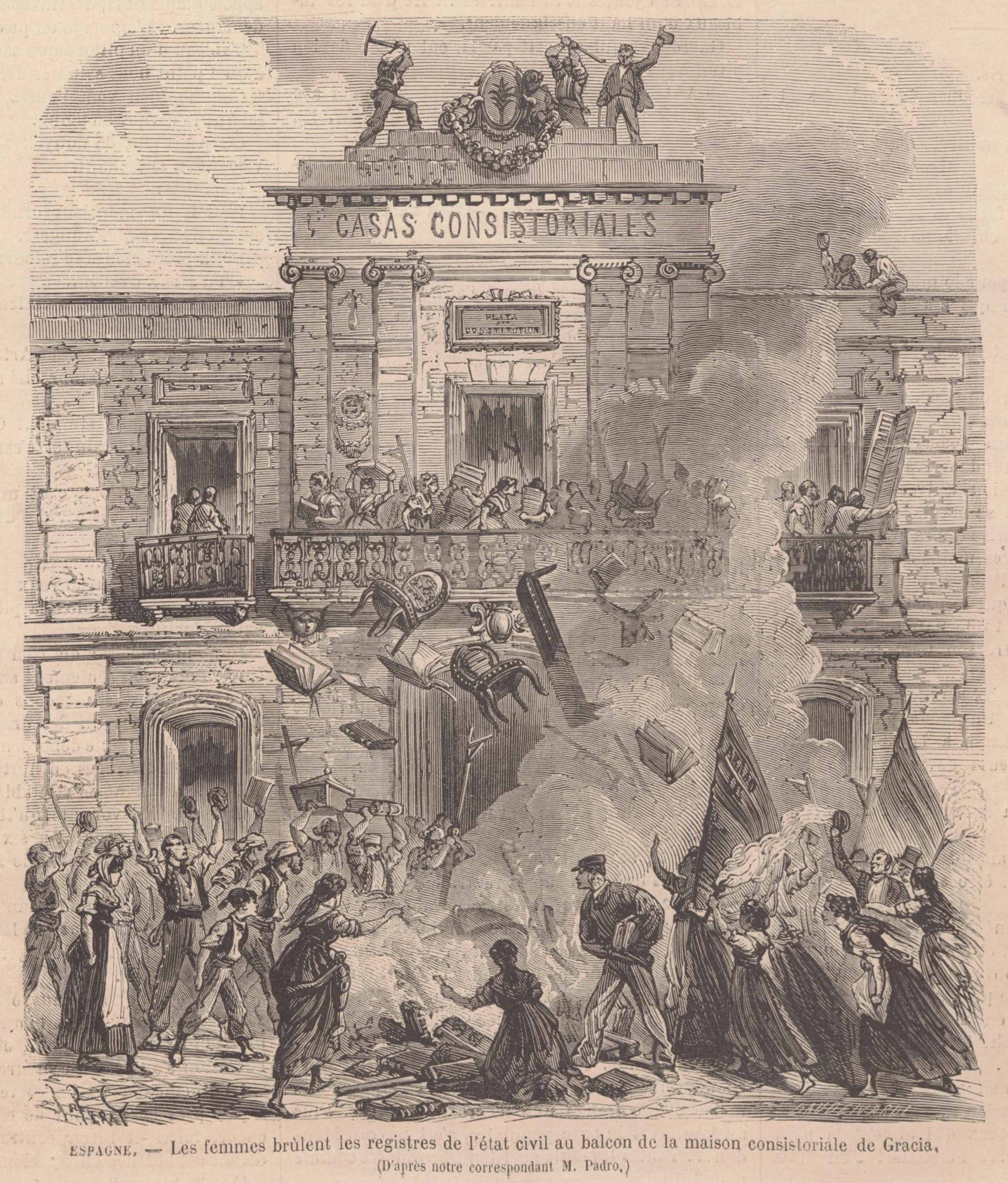 Espagne. Les femmes brùlent les registres de l'état civil au balcon de la maison consistoriale de Gracia. D'après notre correspondant M. Padro..